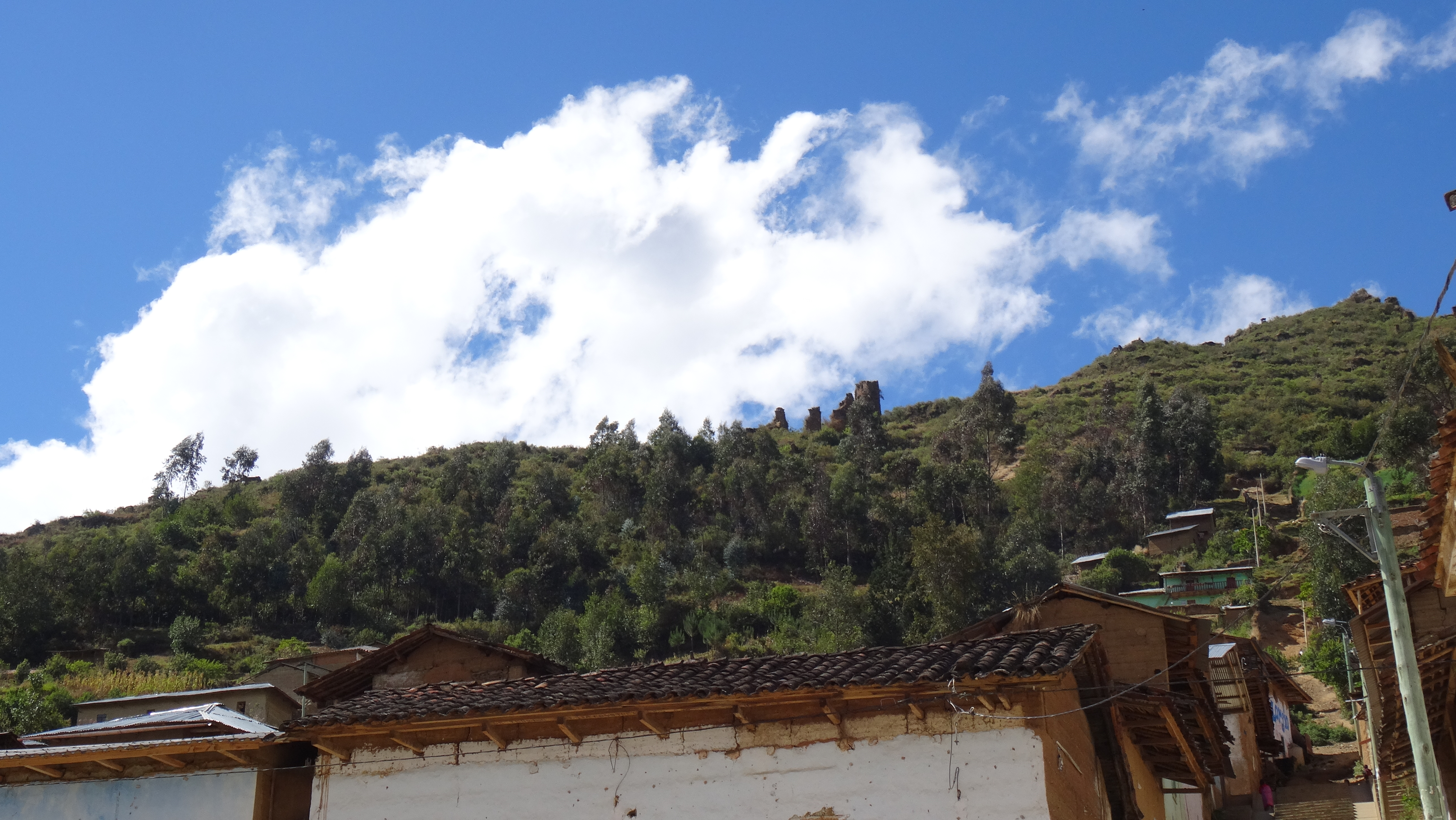 Vista de una de las ruinas de la parte superior del complejo Rapayán desde la misma ciudad de Rapayán.